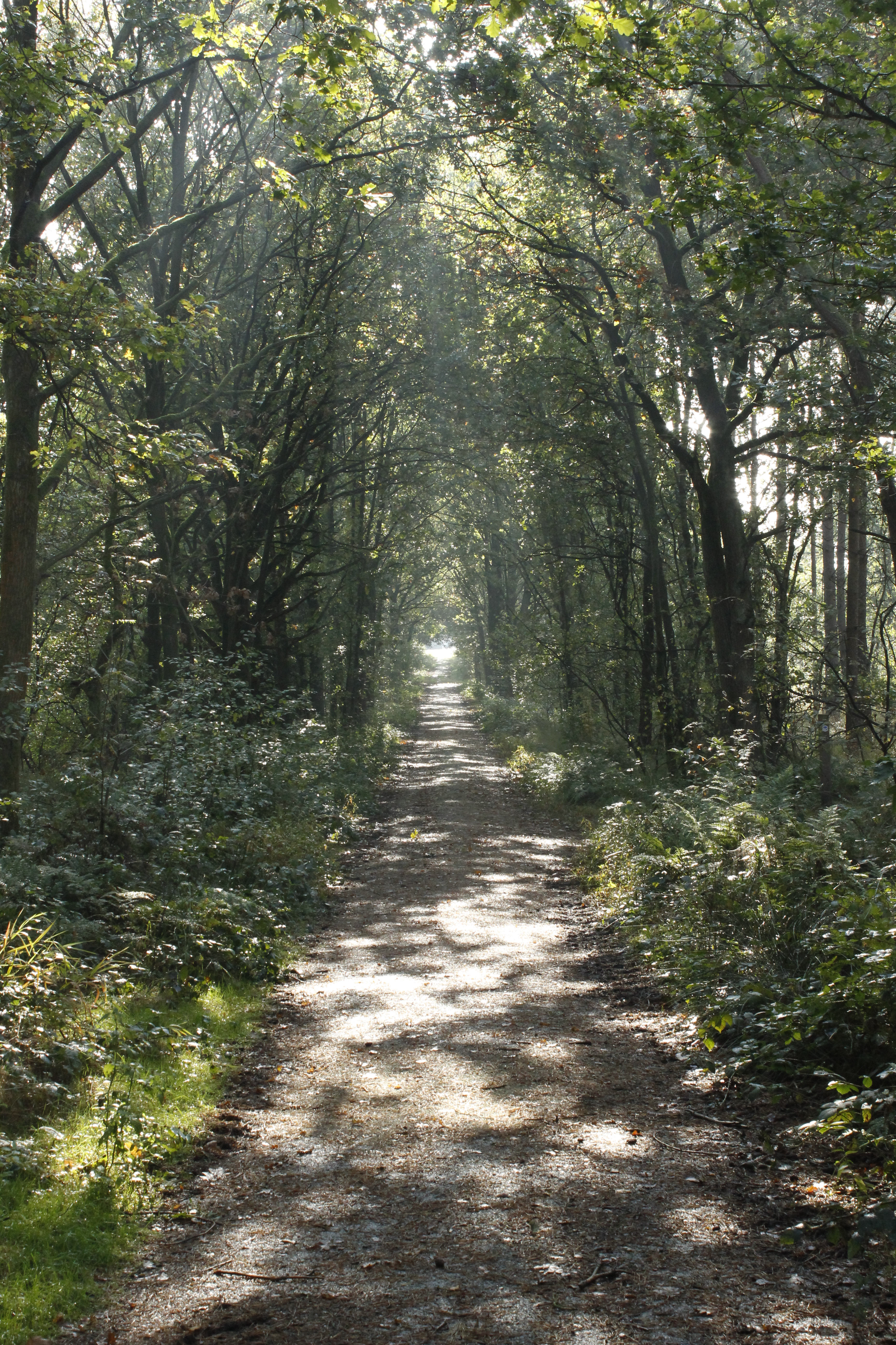 Lente in natuurgebied Bergerven.